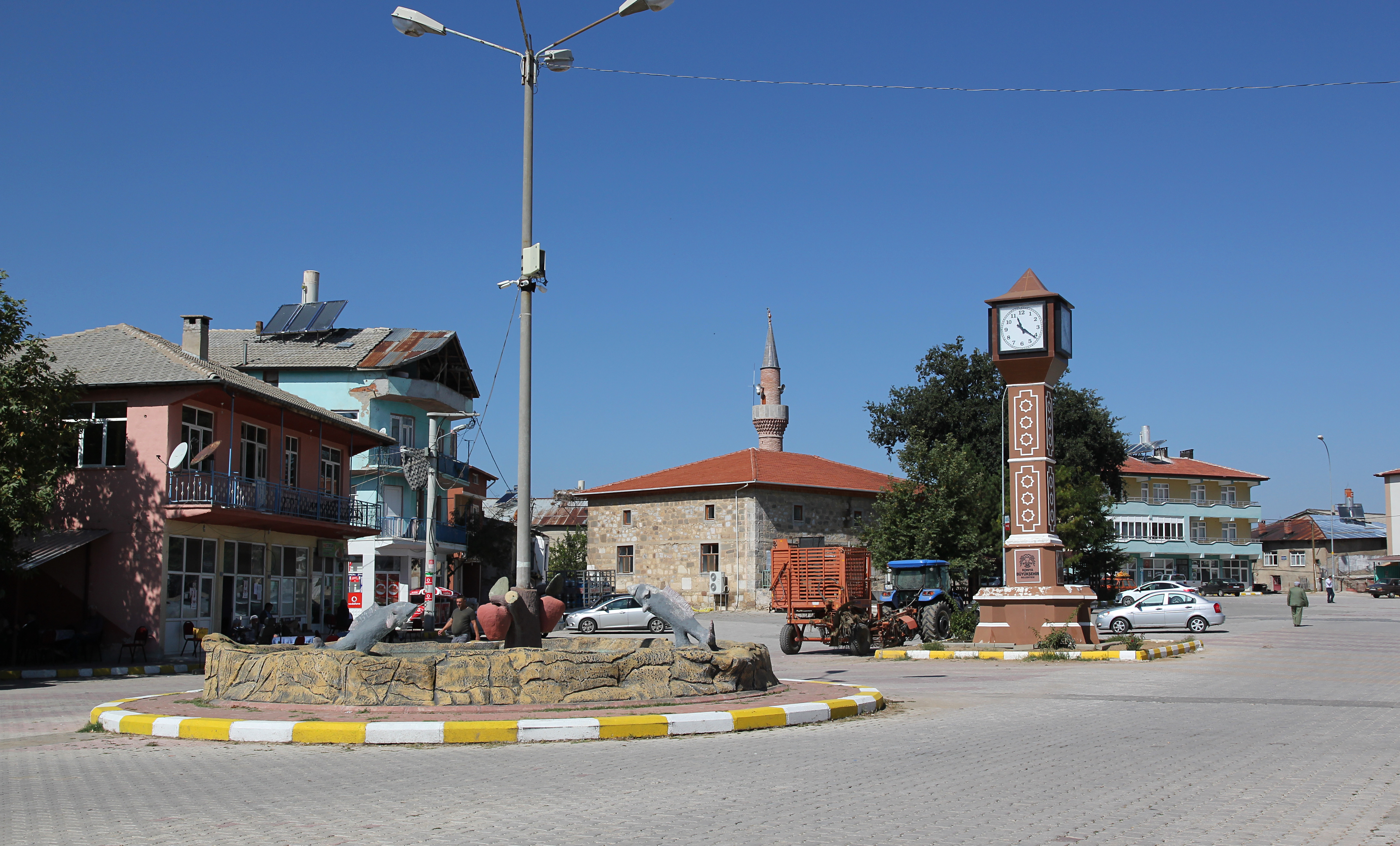 Yalıhüyük, Provinz Konya, Türkei, Uhrturm